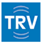 letztes Logo des Verlags TR-Verlagsunion, München, ab 2003